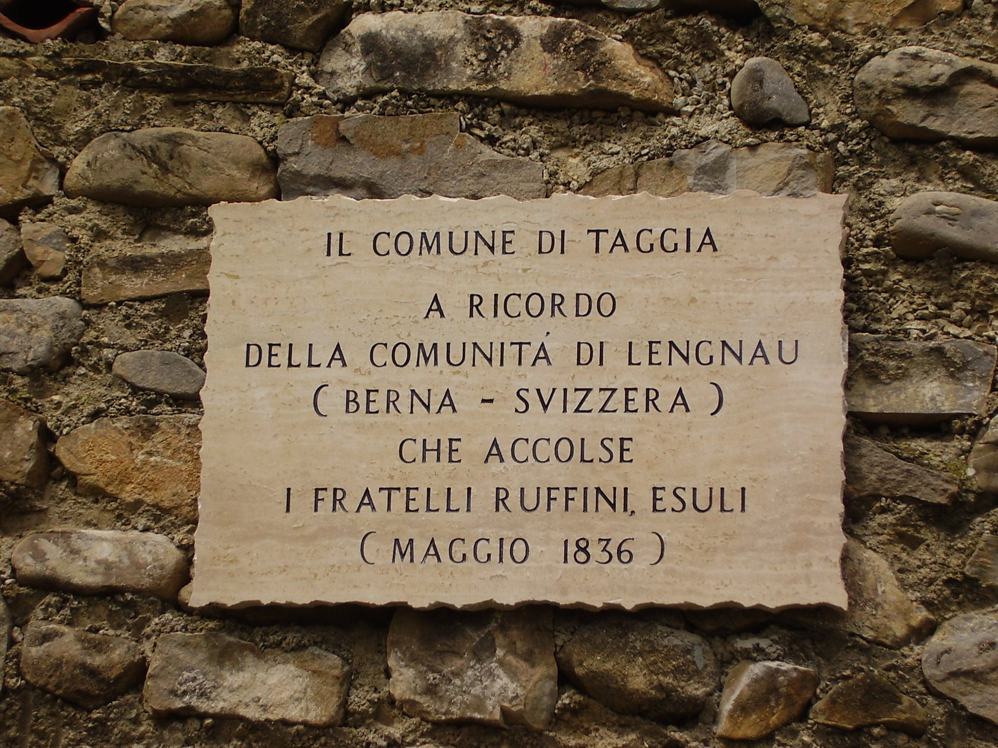 Lapide in Arma di Taggia a ricordo dell'esilio dei fratelli Ruffini a Langnau im Emmental.